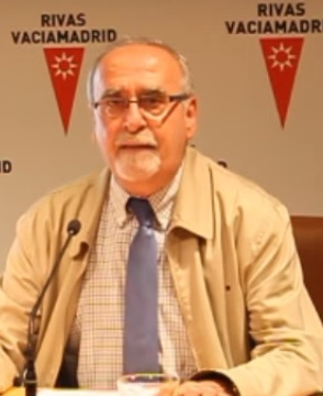 José Masa, 2014.